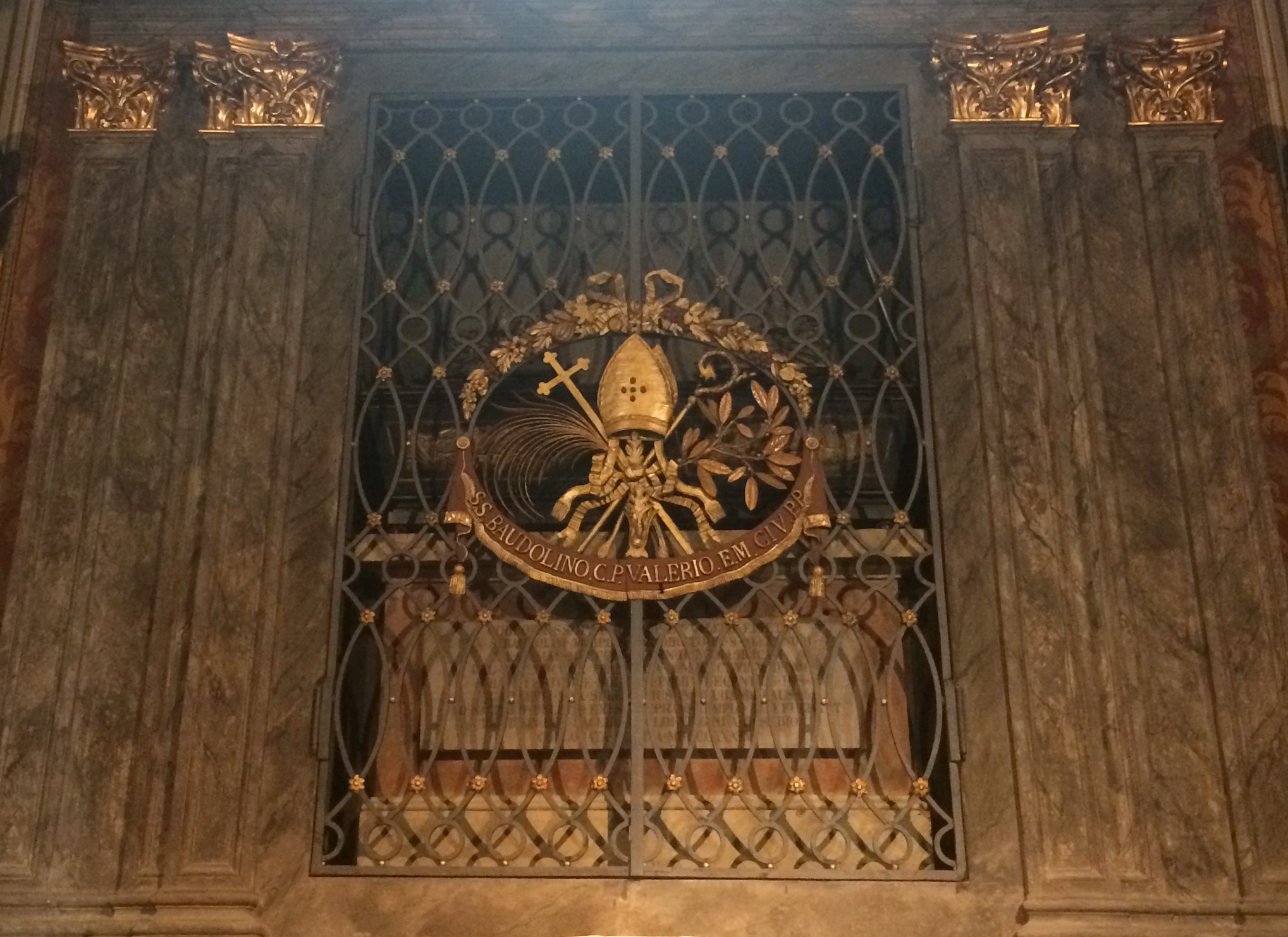 Cattedrale di Alessandria, cappella di san Baudolino, edicola con il sarcofago di san Baudolino posto sopra l'altare. Particolare